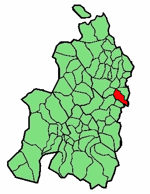 aipaturiko udalerriaren kokapena Nafarroa Beherean